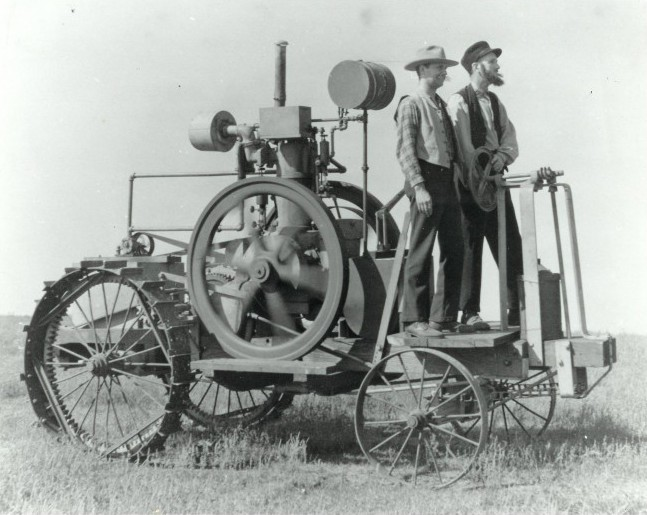 Ancienne photo du tracteur conçu par John Froelich en 1892